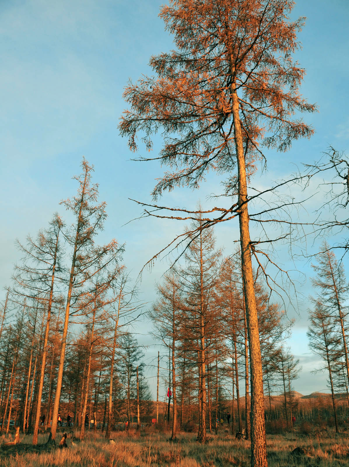 Larix gmelinii, Aershan (Arxan), Inner Mongolia; approx 47°N 120°E.